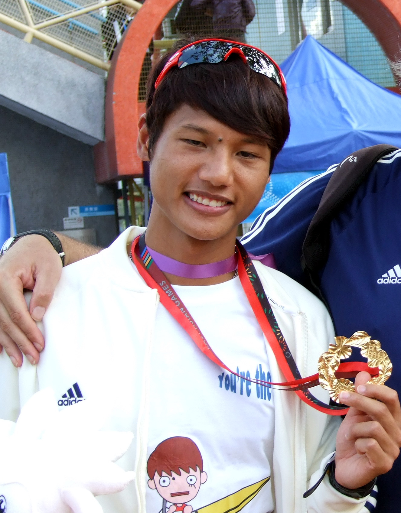 中文（香港）: 鄒廣榮奪得2009年東亞運動會輕量級雙人雙槳艇金牌